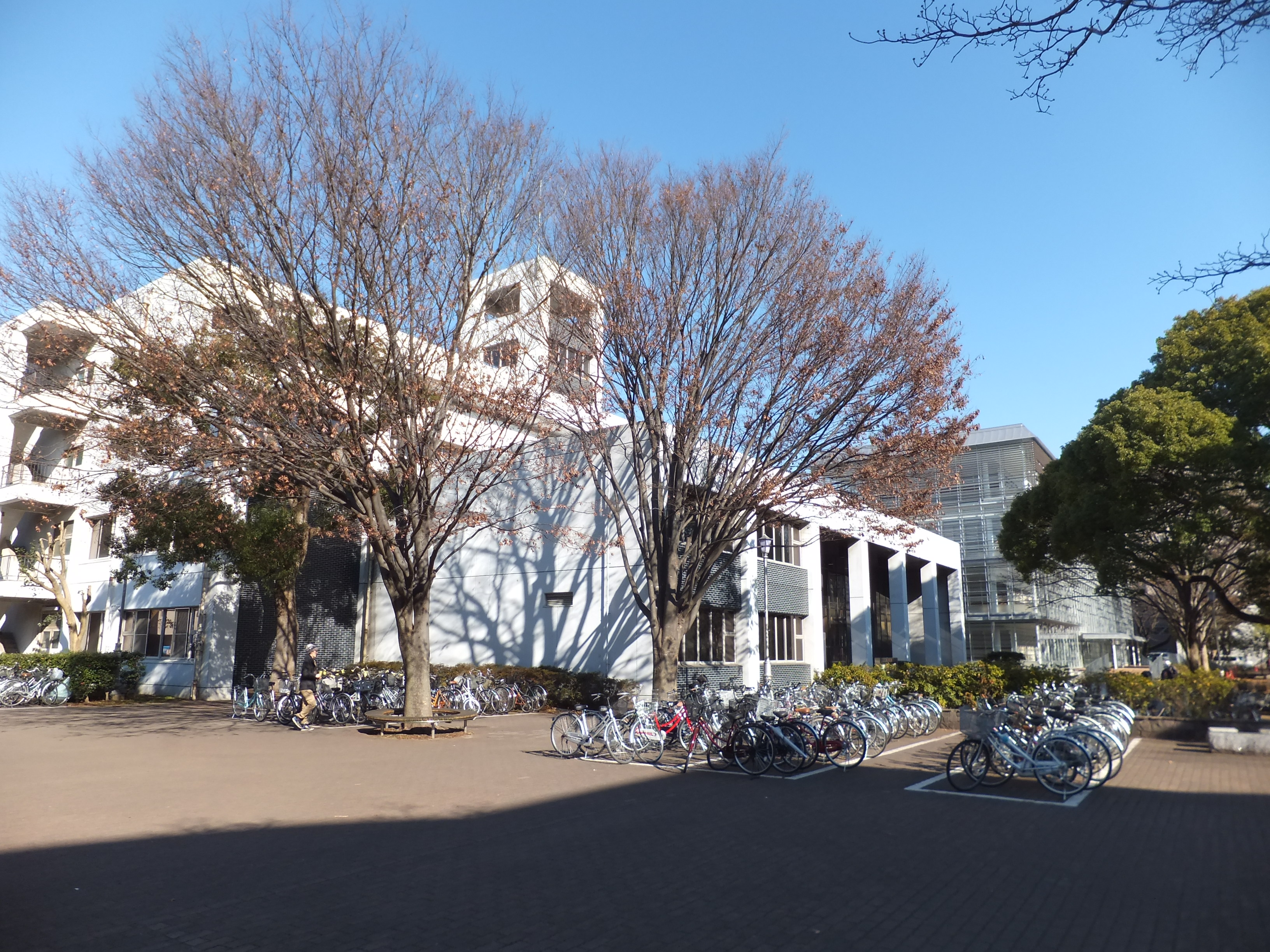 千葉大学附属図書館